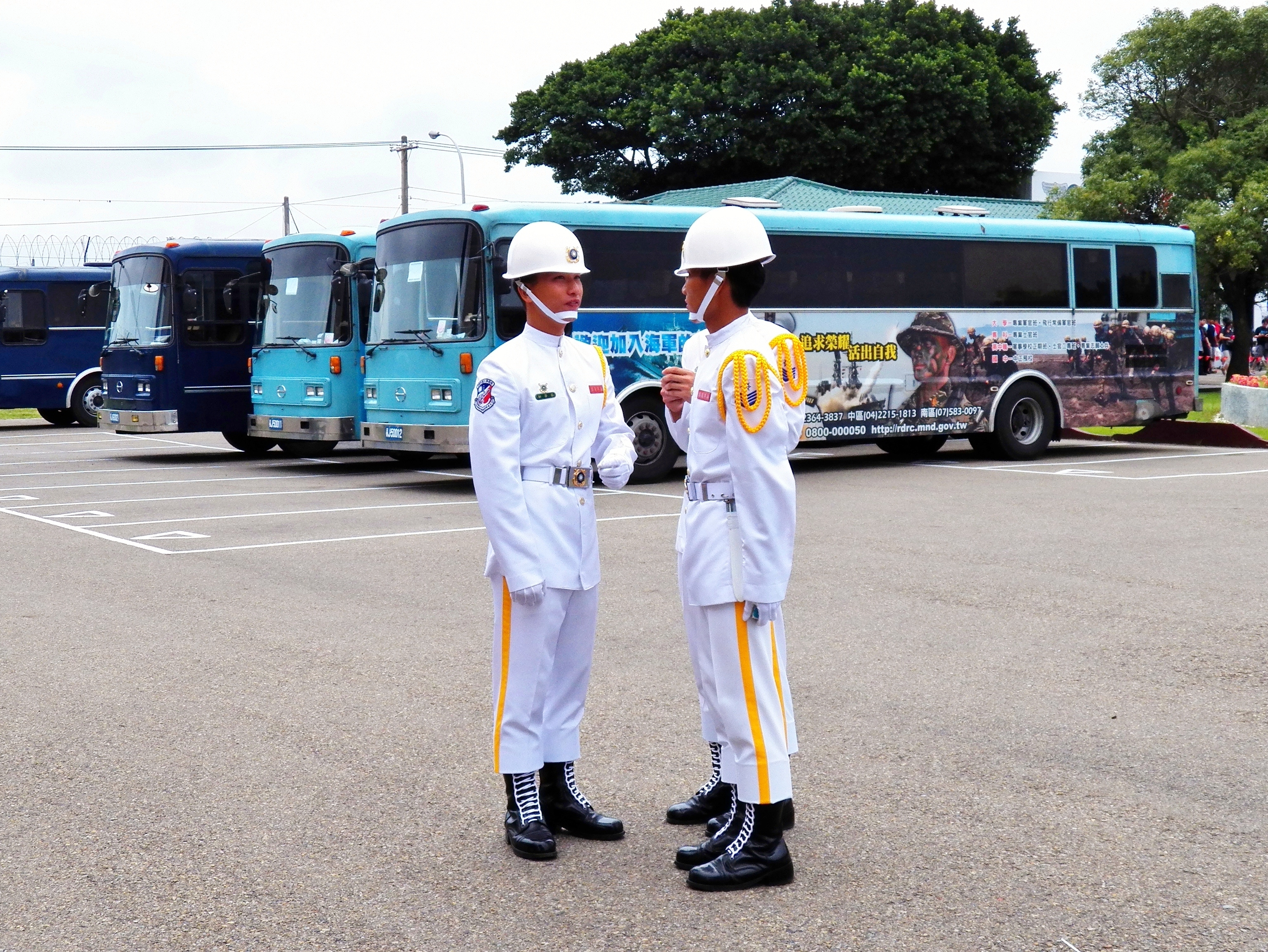 2012年空軍新竹基地營區開放活動，上午三軍儀隊表演結束後，三名身著夏季制服的海軍儀隊隊員於中正堂前停車場交談；後方兩輛海軍日野大客車側貼海軍募兵廣告。